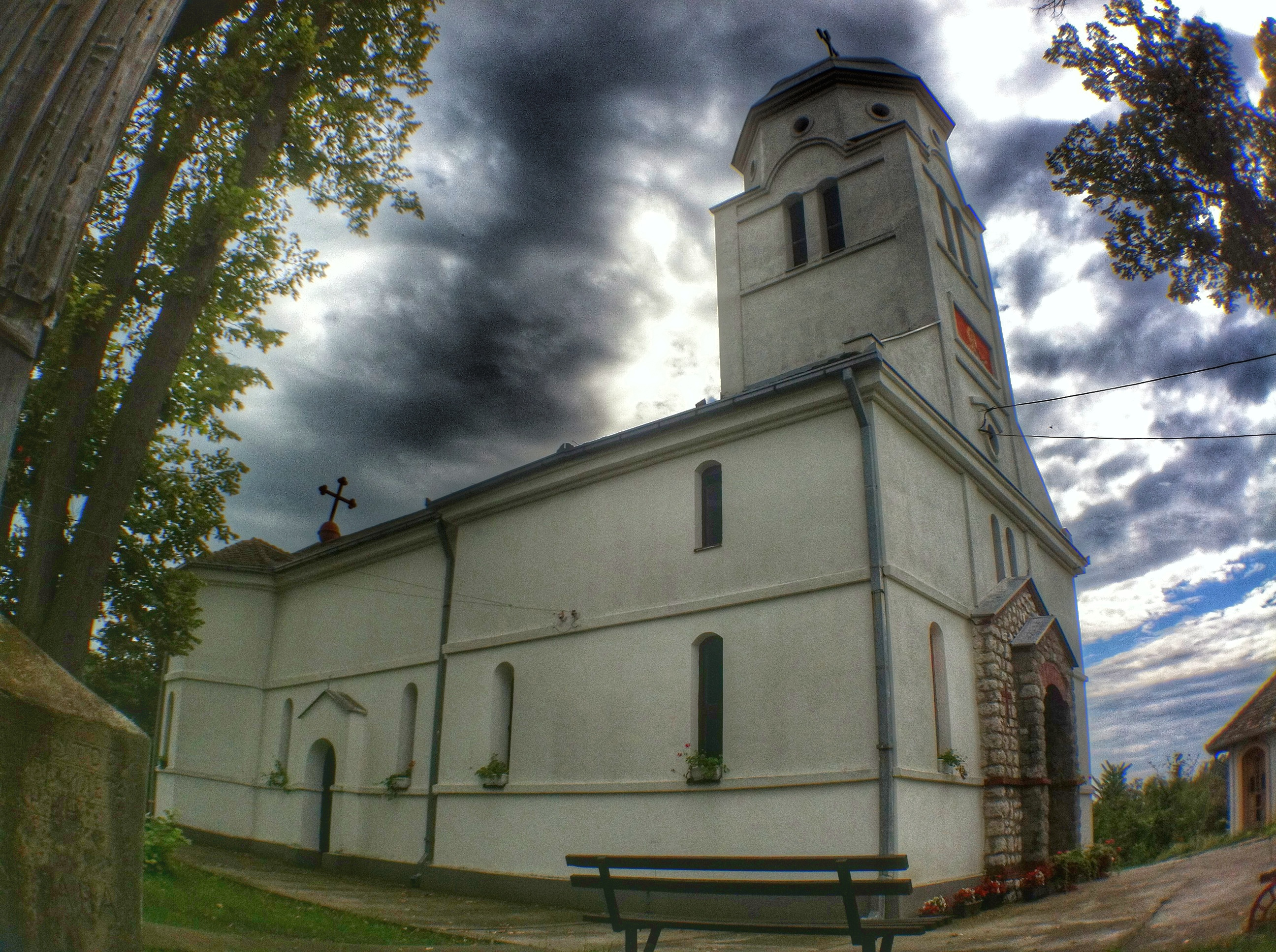 Српски (ћирилица): Црква је настала 1890.године.